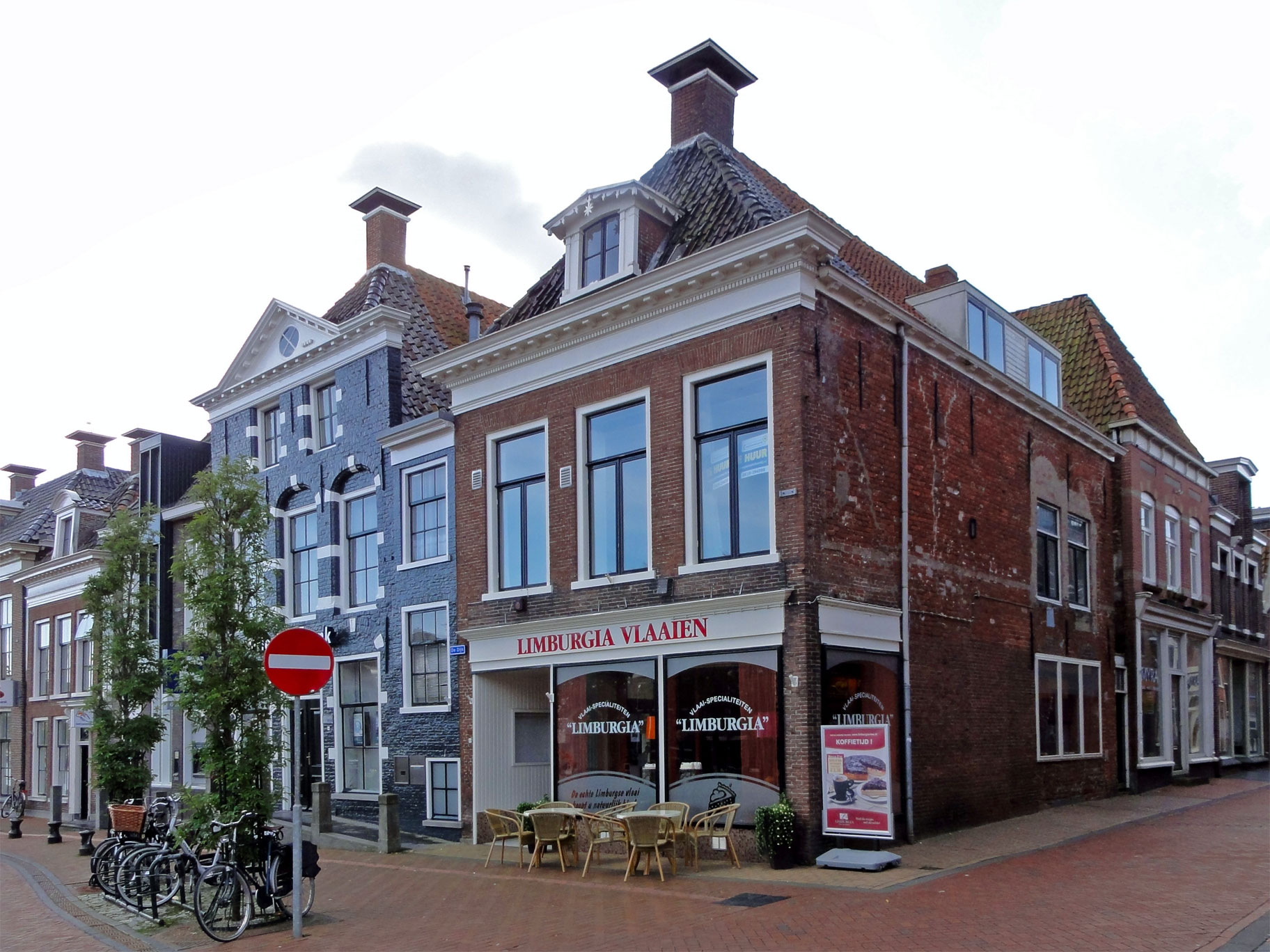 De Dijk 4 en 2, Dokkum, rijksmonument